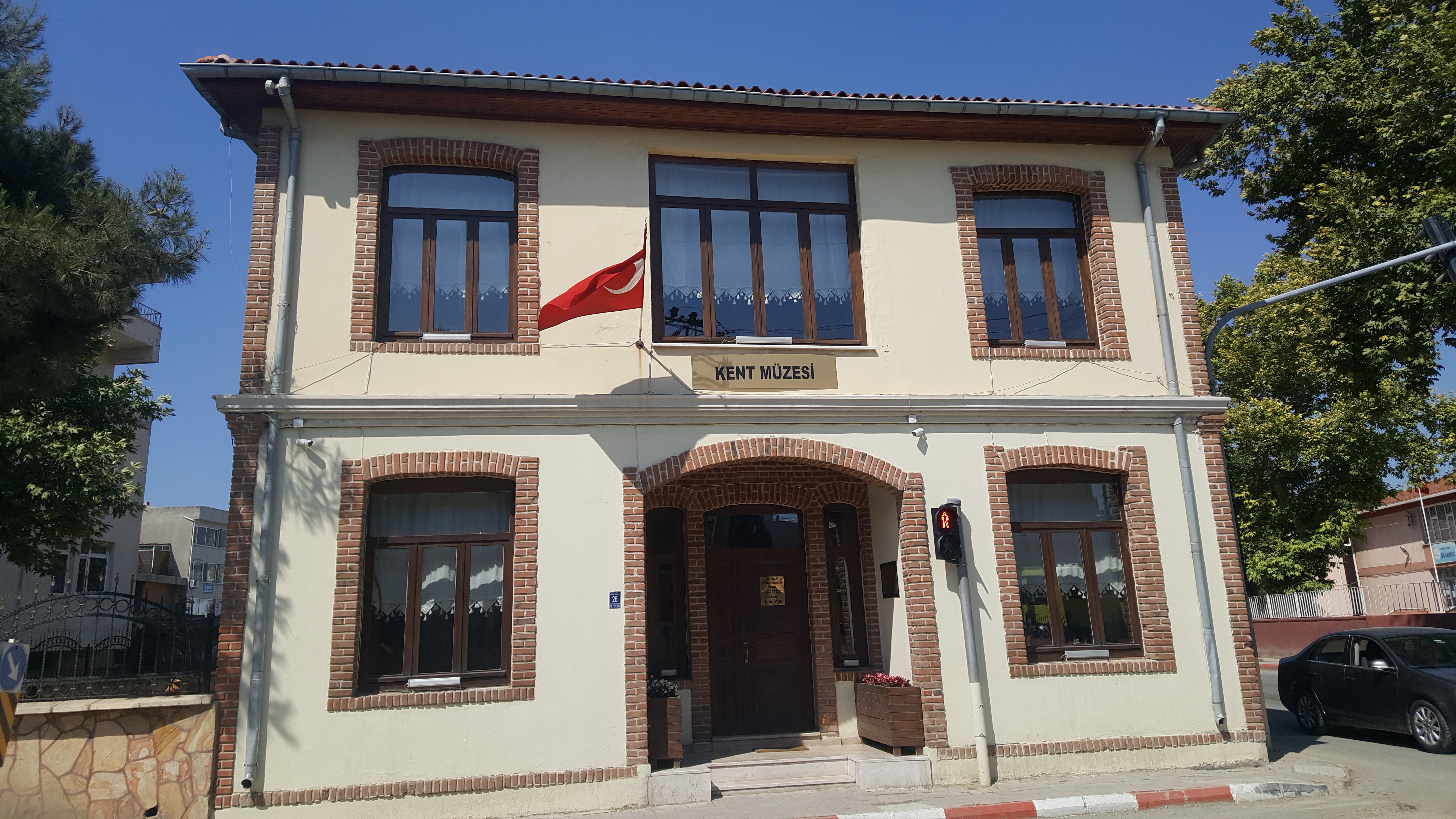 Şarköy Kent Müzesi